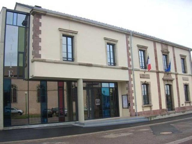 Arches (Vosges).